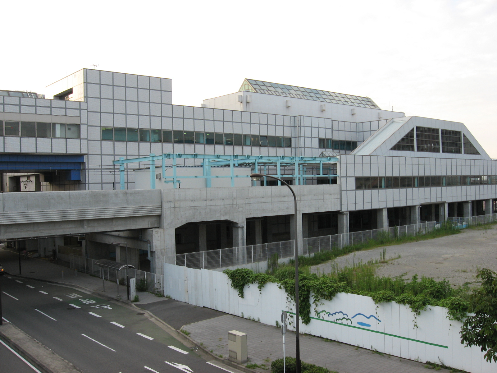 2006年8月29日、利用者自身の撮影。